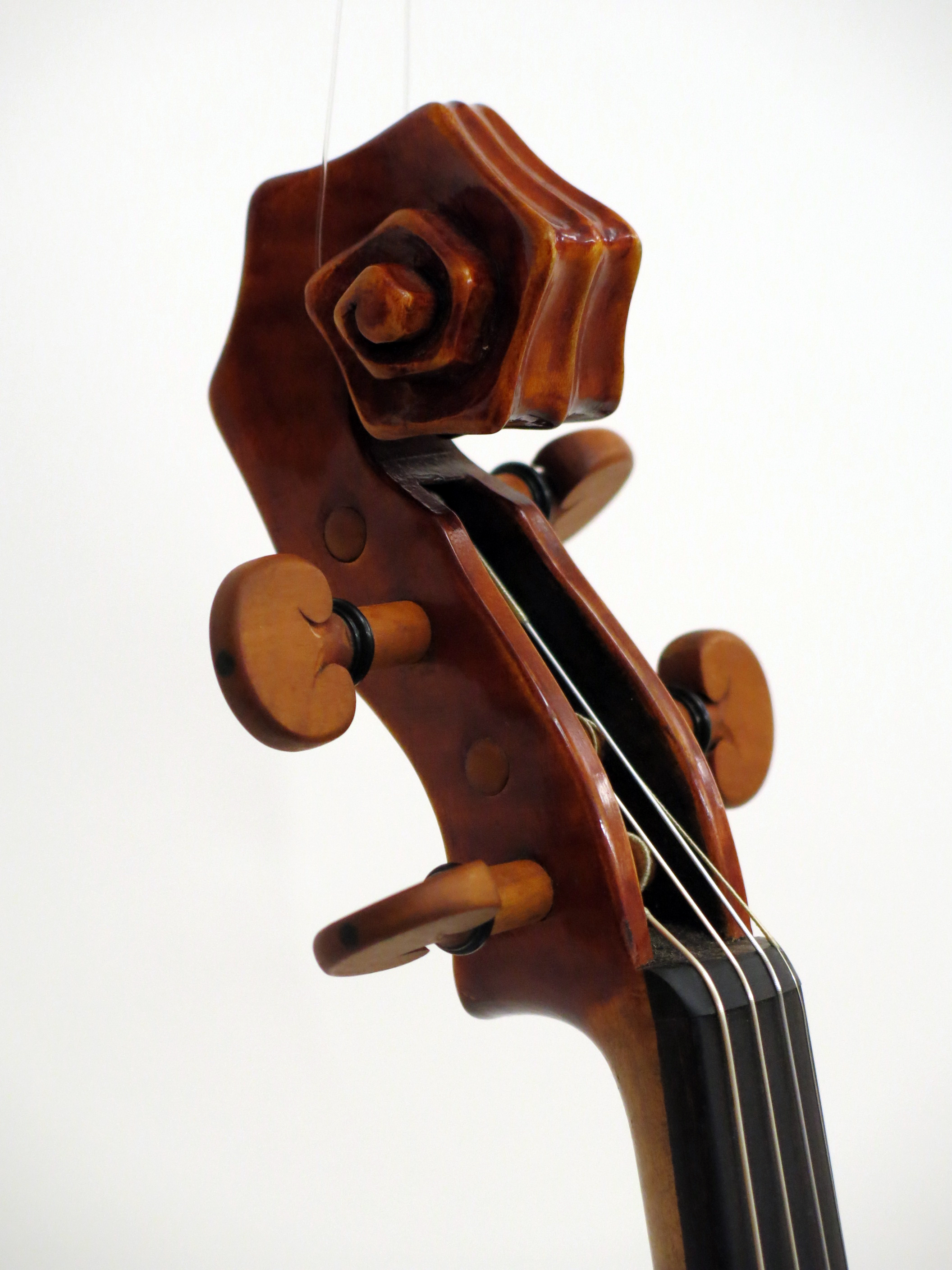 Violin by Guillem García Cubí. Cremona. 2002. Museu de la Música. (MDMB 1651)